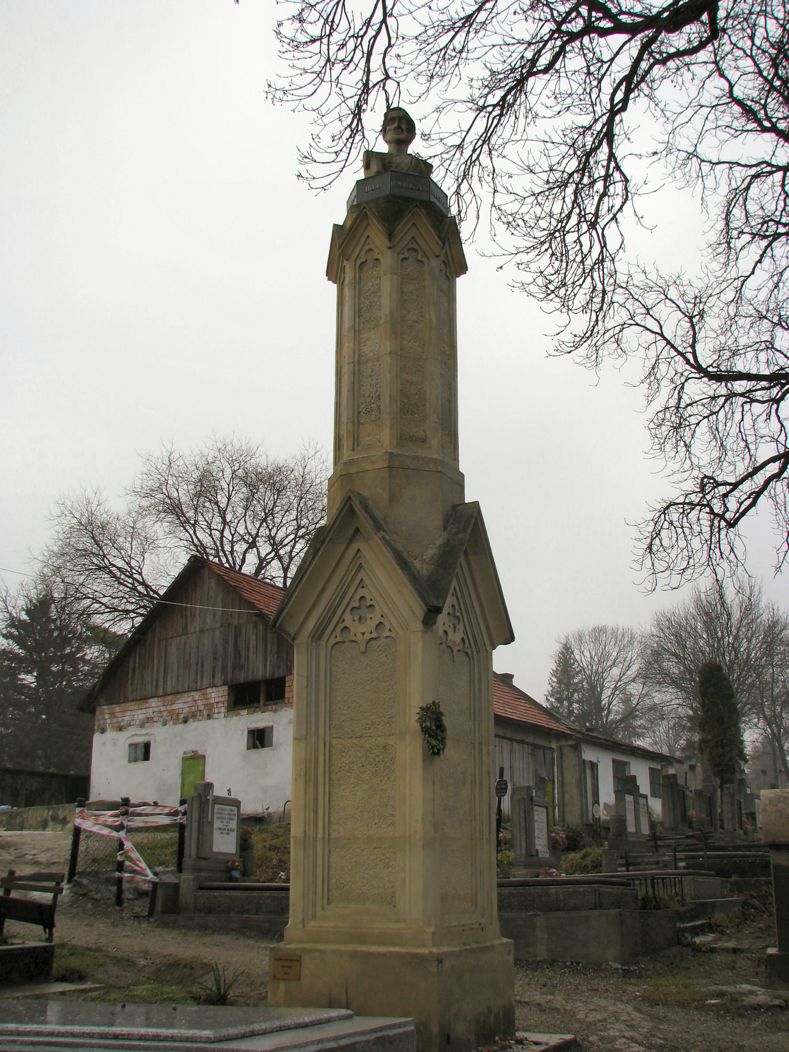 Bölöni Farkas Sándor sírja a kolozsvári Házsongárdi temetőben 127